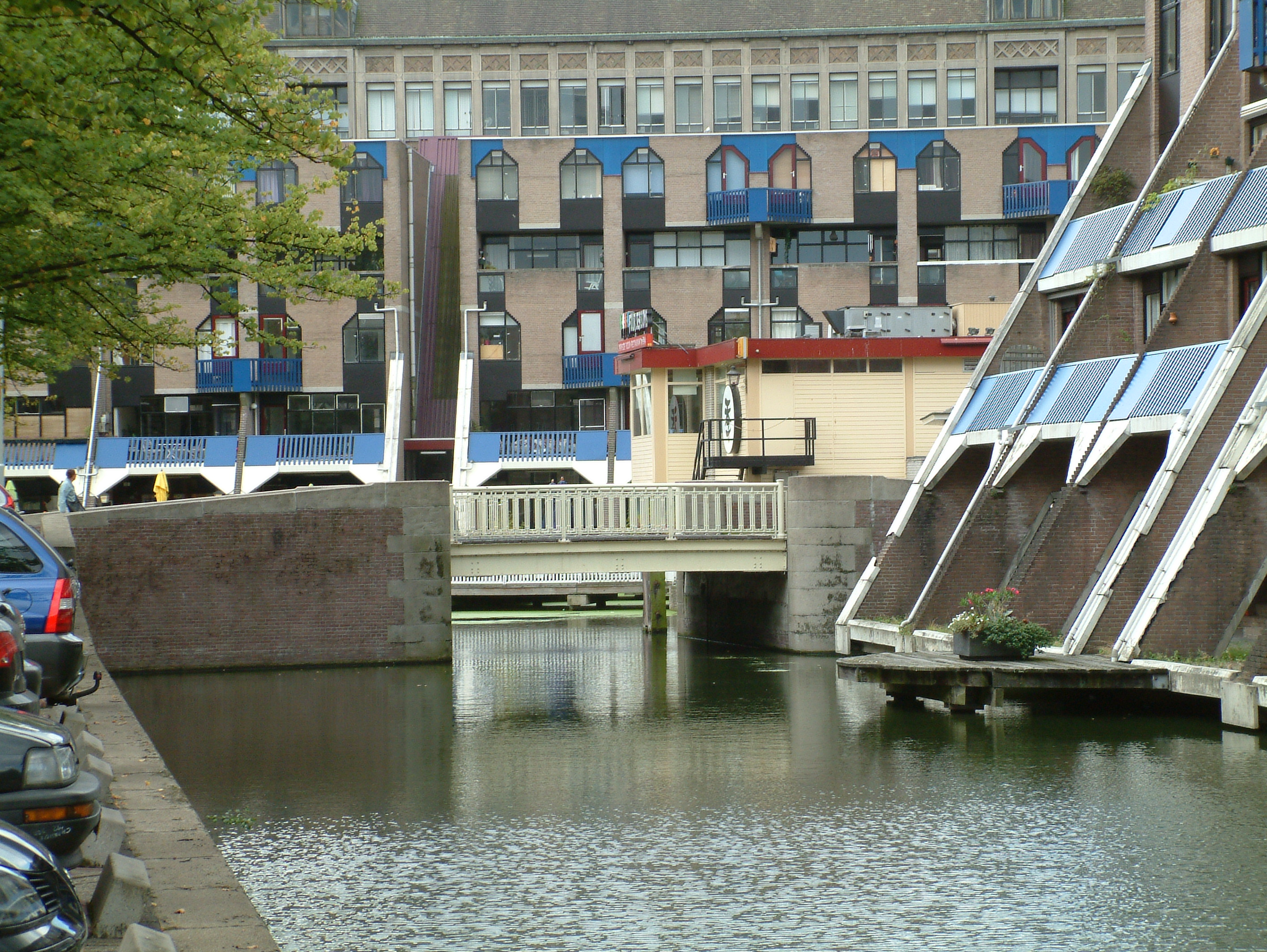 Bruggen over de Rotte, De Stokvisbrug, oostkant